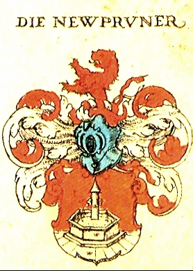 Wappen des Ulmer Patriziergeschlechts Neubronner („Die Newpruner“) in Johann Siebmachers Wappenbuch von 1605, Tafel 218, „Ulmische Erbare Geschlecht.“, später geadelt als v. Neubronner bzw. Neubronn v. Eisenburg (auch v. Neubronn-Eisenburg): Johann Siebmacher: New Wappenbuch, eingescannt aus: Horst Appuhn (Hrsg.), Johann Siebmachers Wappenbuch. Die bibliophilen Taschenbücher 538, 2. verb. Aufl , Dortmund 1989 Ulmer Blatt 218